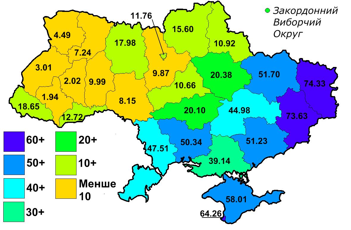 Результат Партії Реґонів за областями